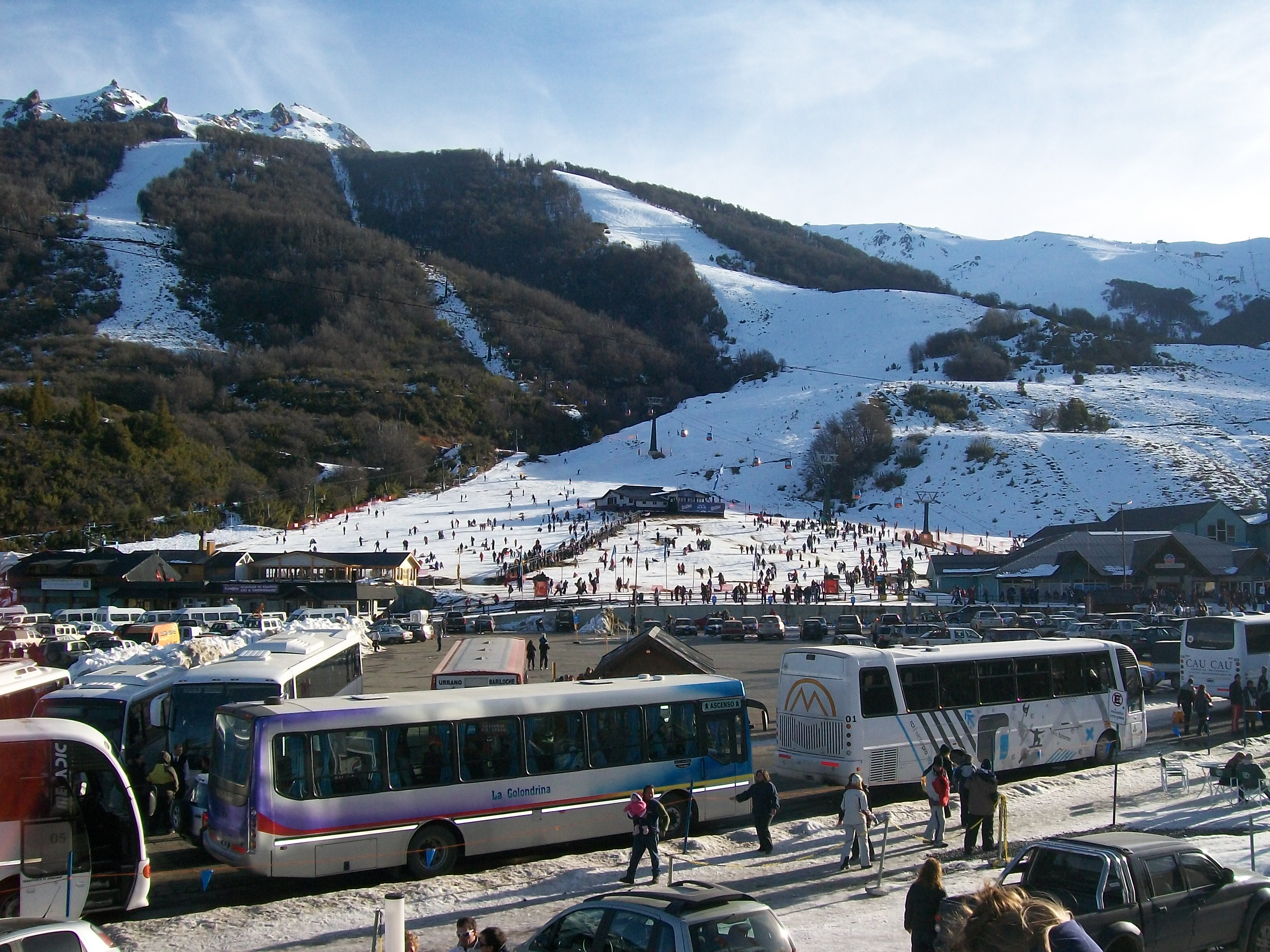 Base del Cerro Catedral en Bariloche. (Patagonia Argentina)